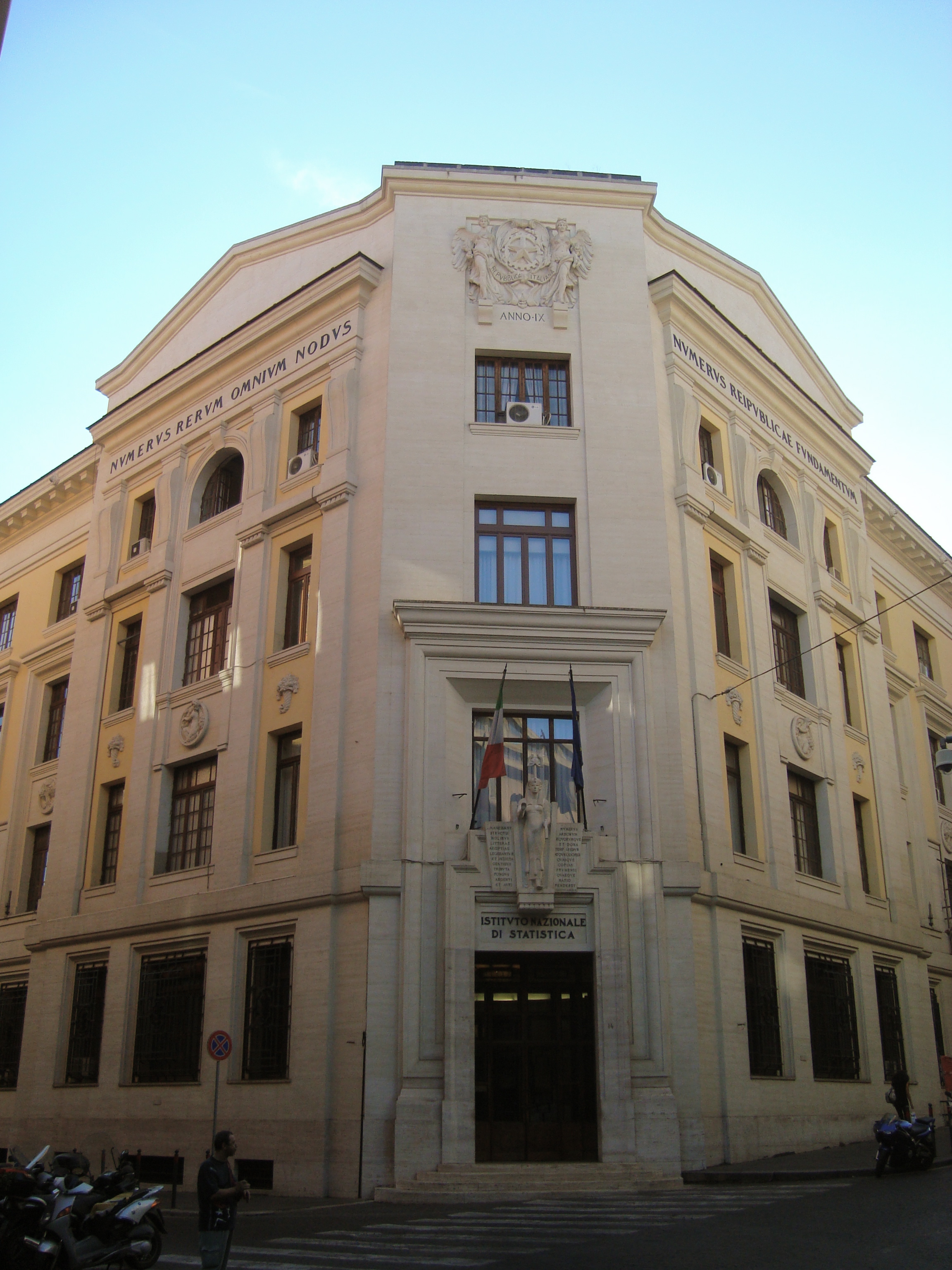 Batiment de l'Institut national de statistique à Rome, Italie